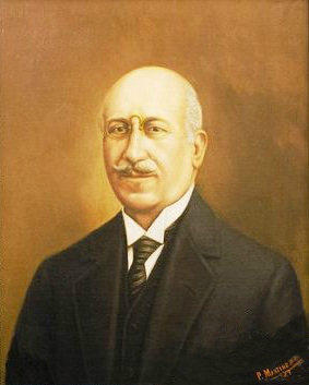 Retrato de Carlos Van Buren Vallejo, óleo de P. Martínez